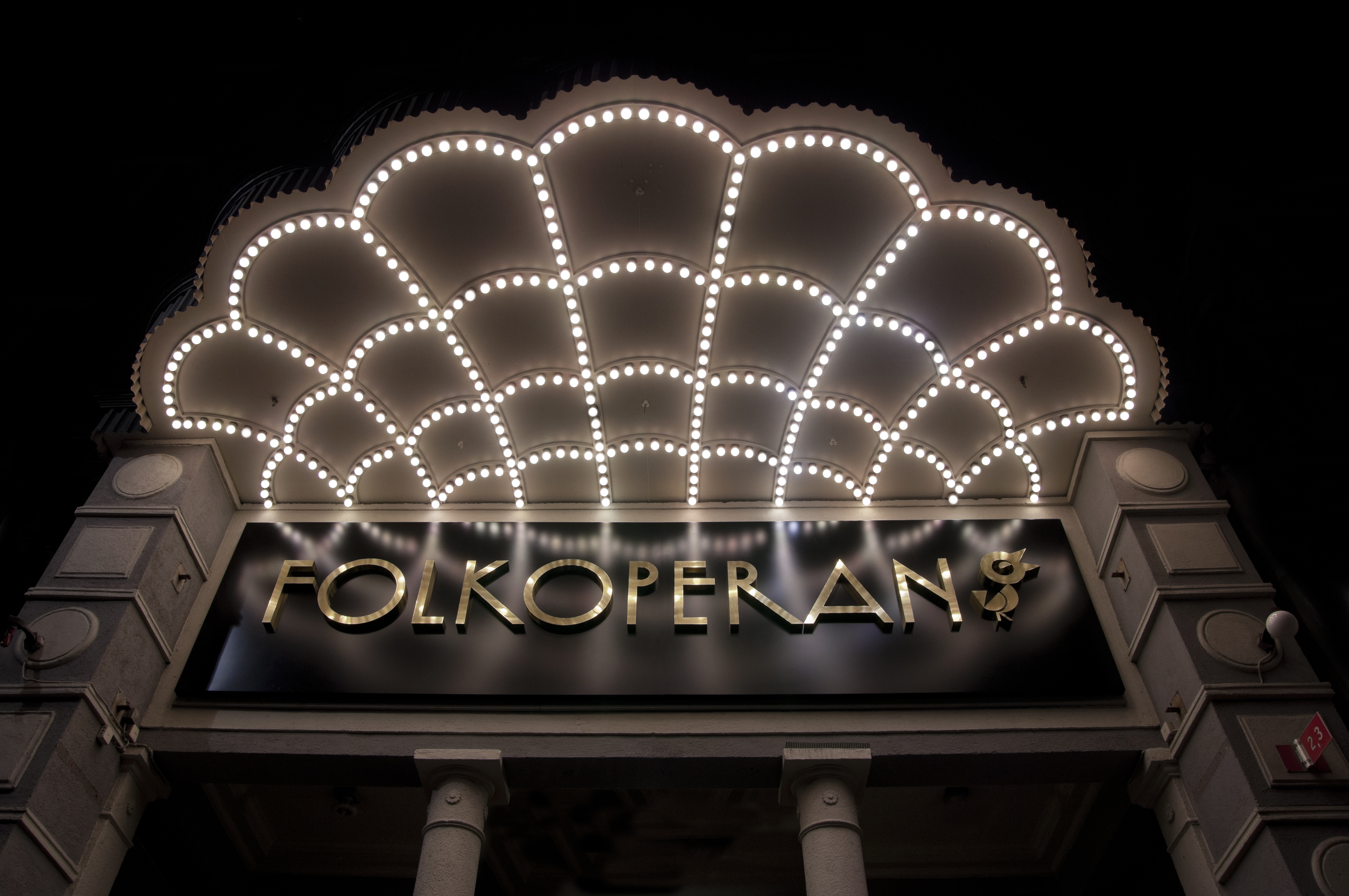 Folkoperans entré 2014. Foto Noel Pretorius.